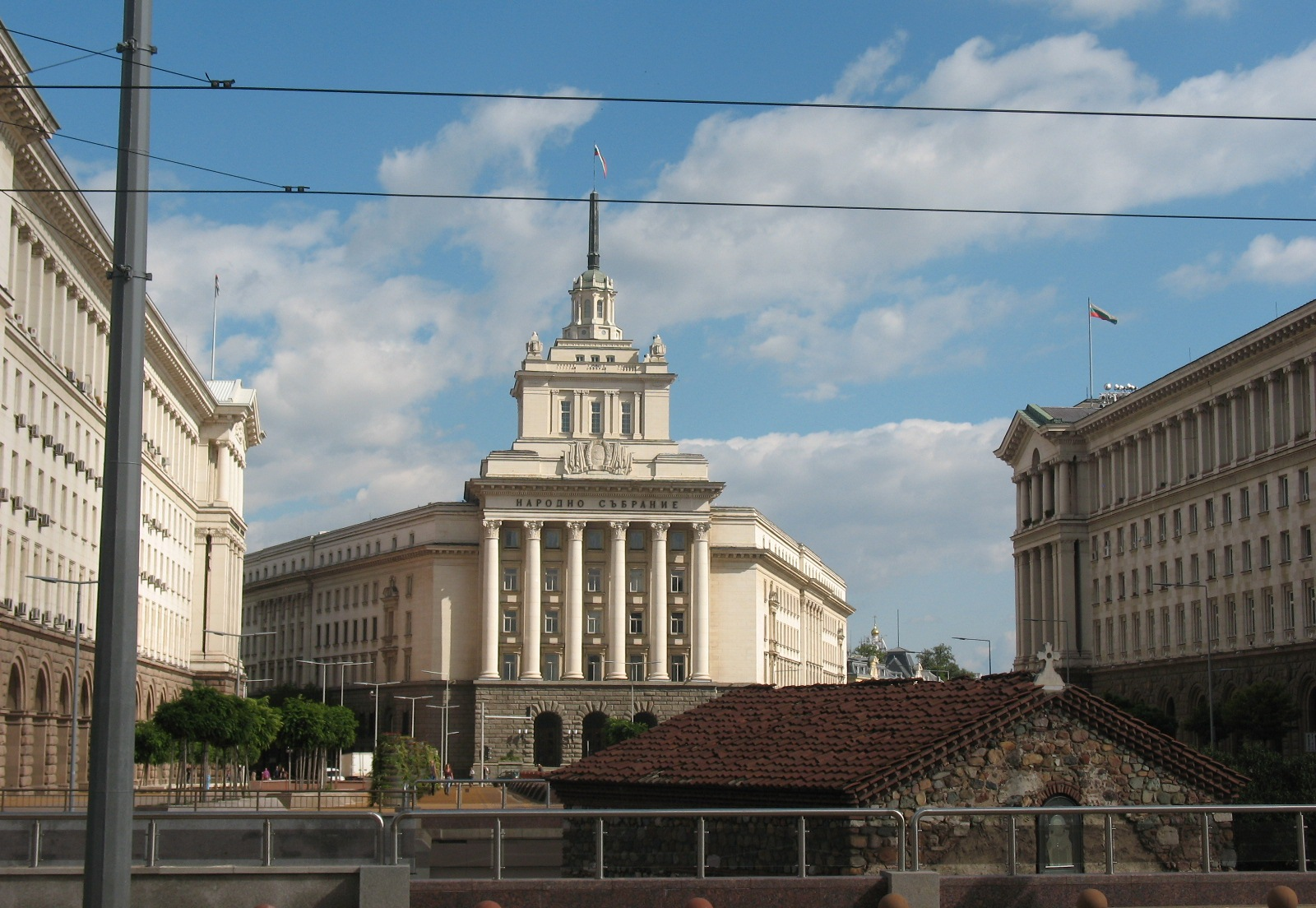 Народное собрание Болгарии